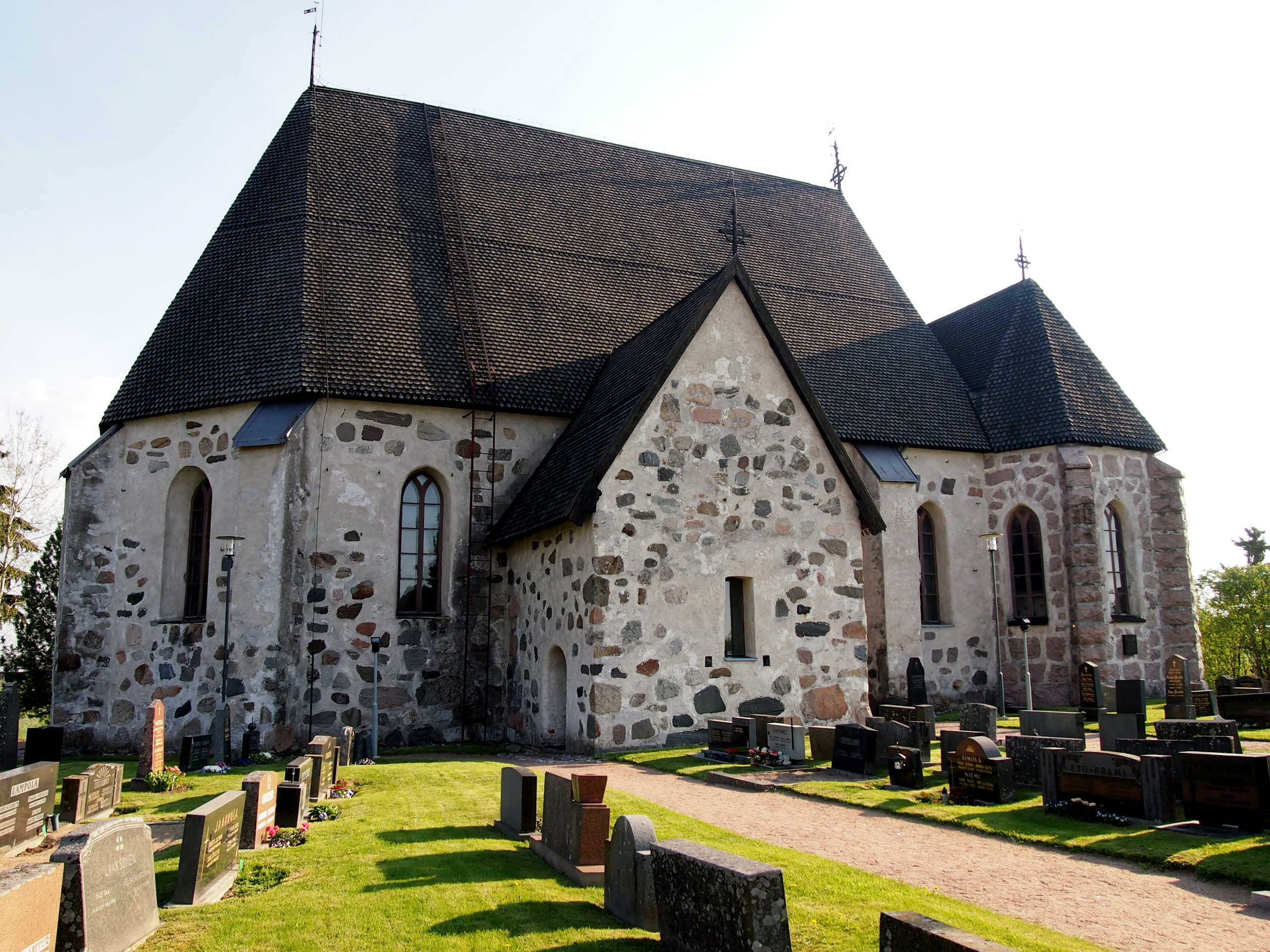 Nousiaisten kirkko